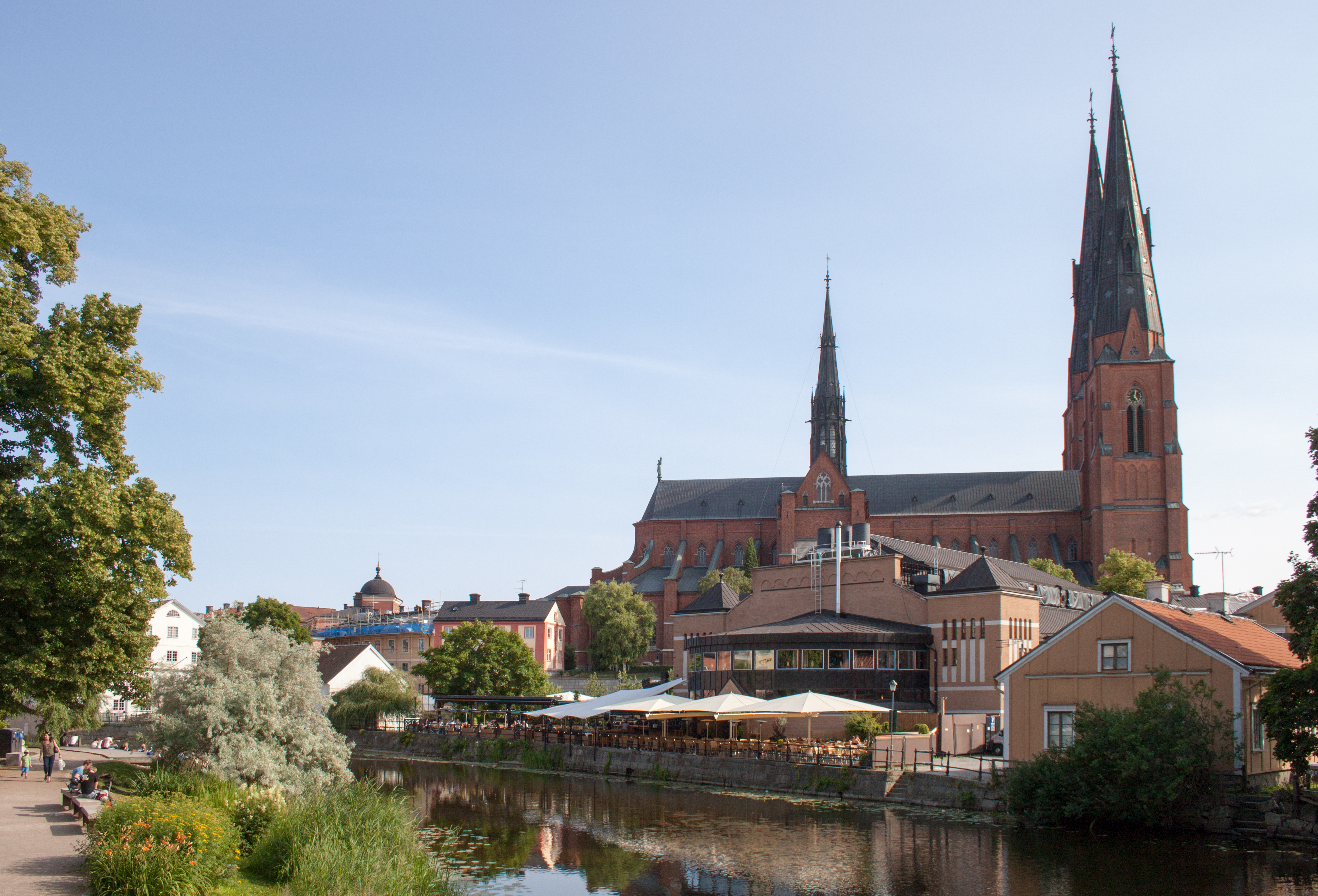 Fyris River in Uppsala